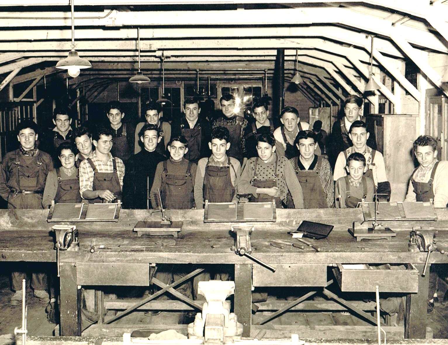 Atelier des ajusteurs-tourneurs-fraiseurs installé dans des préfabriqués US de l'armée américaine concédés au Centre d'apprentissage Georges Lamarque à Nice (Alpes Maritimes) France